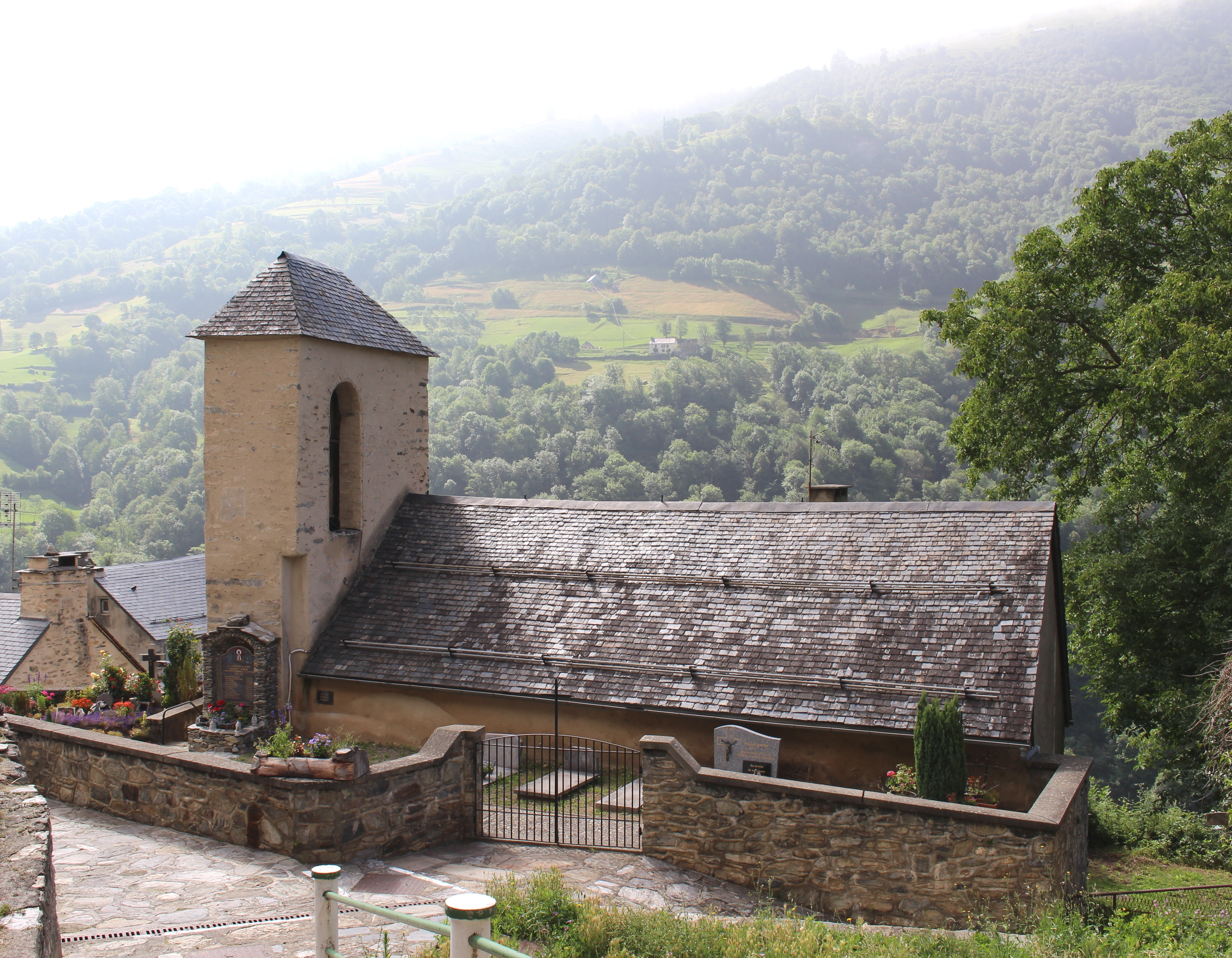 Église Saint-Sylvestre de Viey (Hautes-Pyrénées)